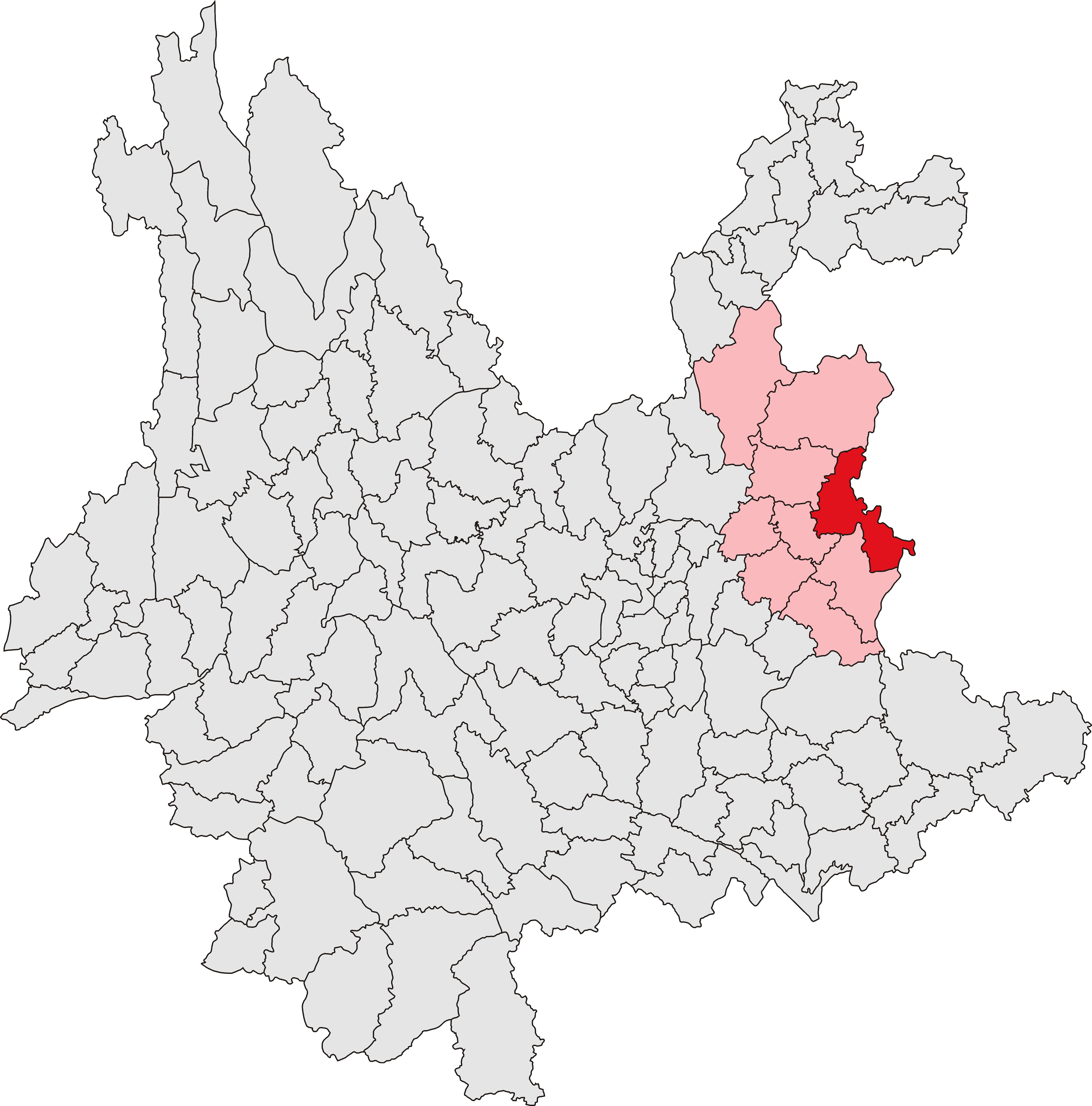 中文（中国大陆）: 富源县位置图